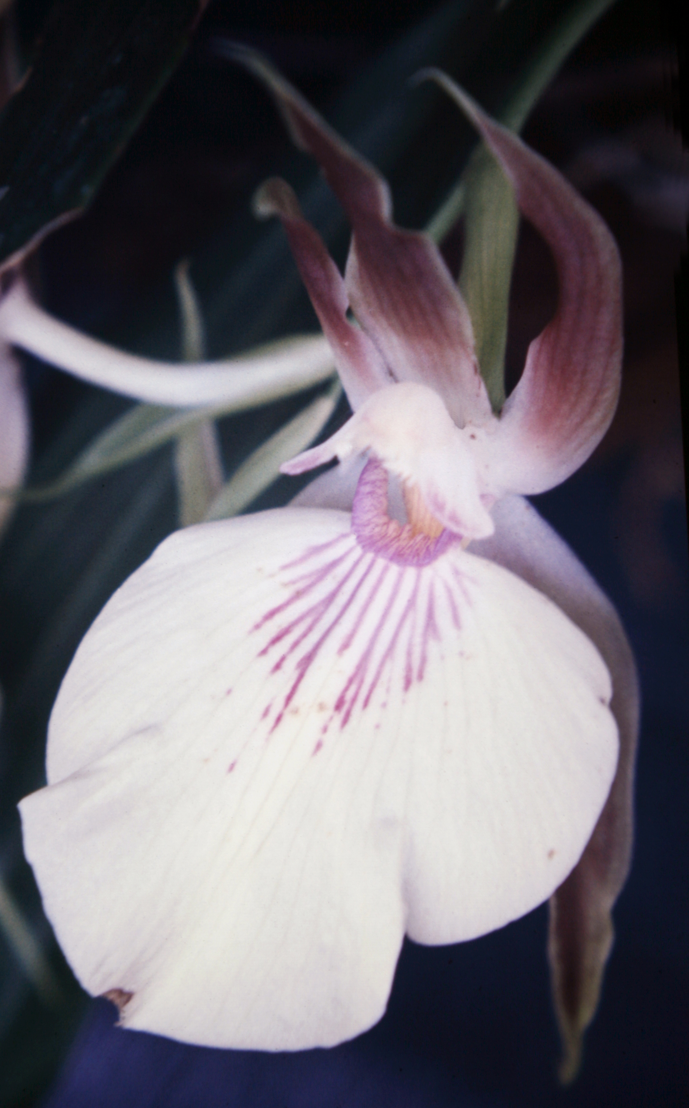 Zygosepalum labiosum, Suriname.